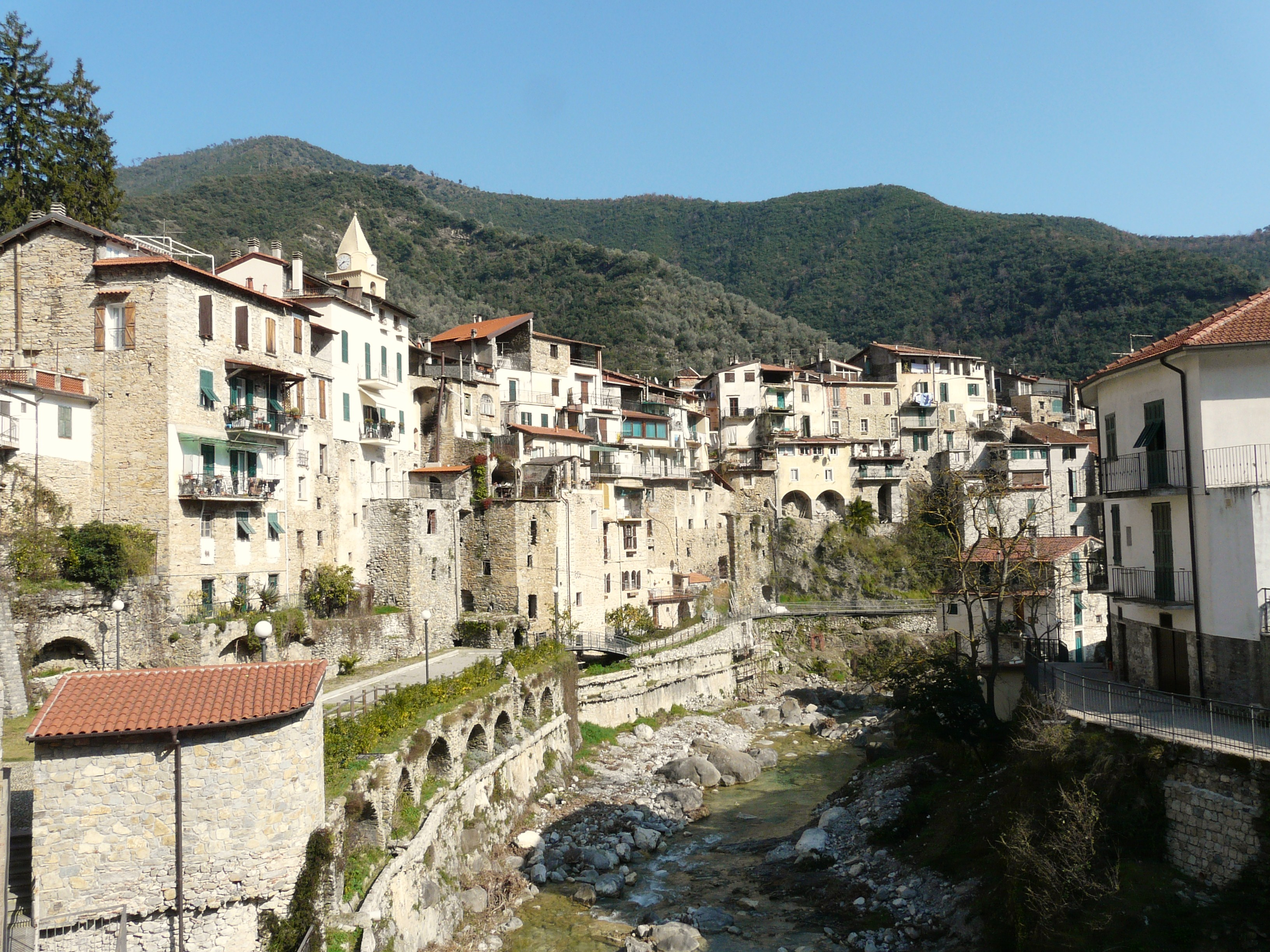 Rocchetta Nervina, Liguria, Italia